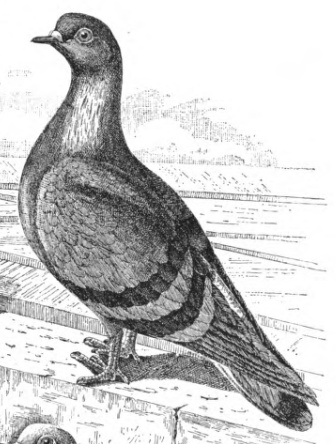 Tafel 1 aus Jean Bungartz' Taubenracen: Feldtaube.